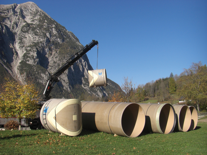 HOBAS Trinkwassertanks.